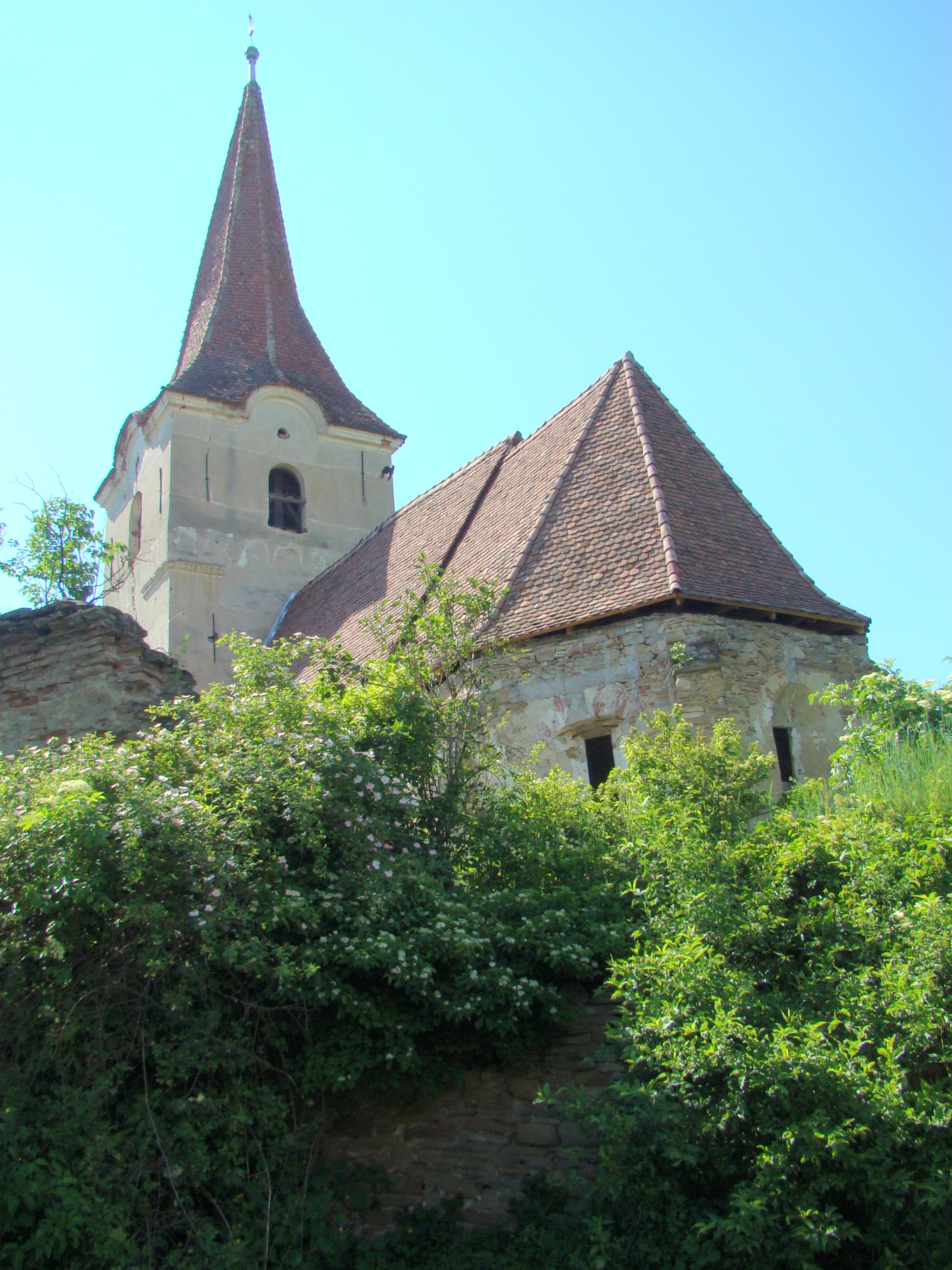 Ansamblul bisericii evanghelice fortificate, sat Filitelnic; comuna Bălăușeri